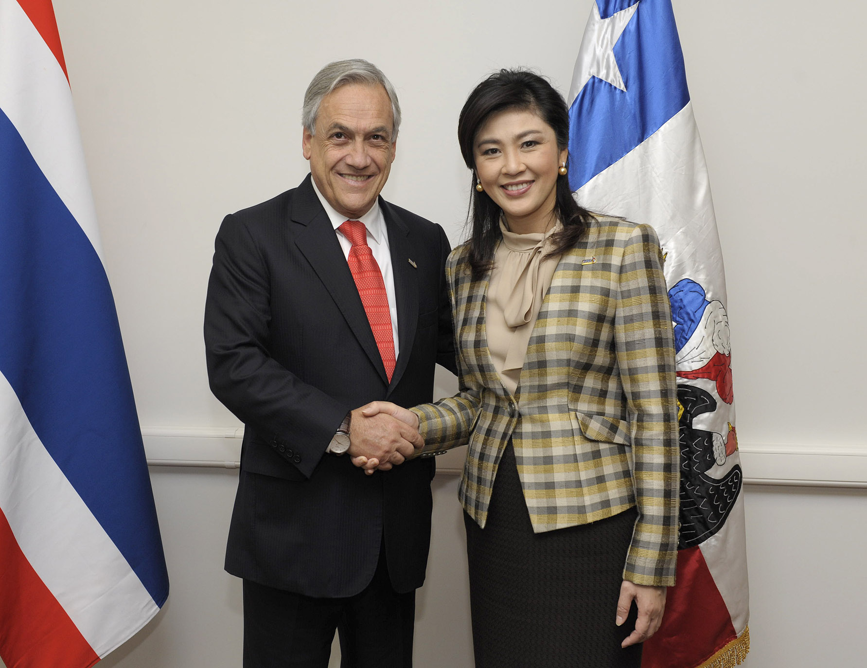 05-09-2012 / 09-09-2012 Cumbre APEC Rusia